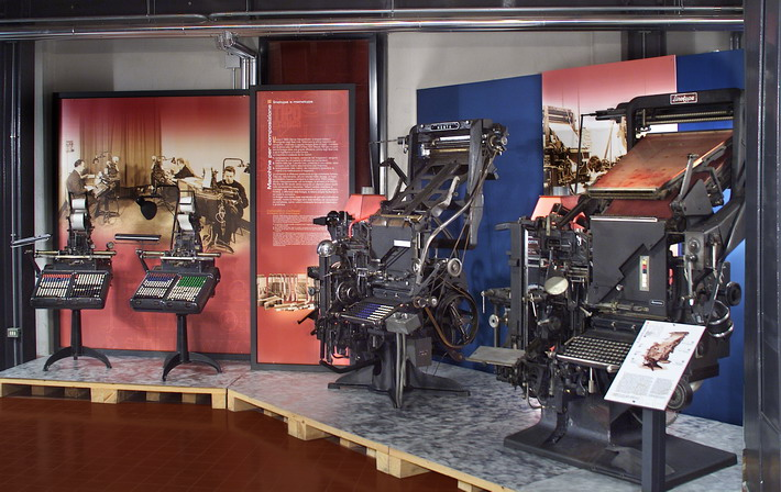 Macchine da stampa della Sezione Tipografica dell'Istituto Aldini-Valeriani